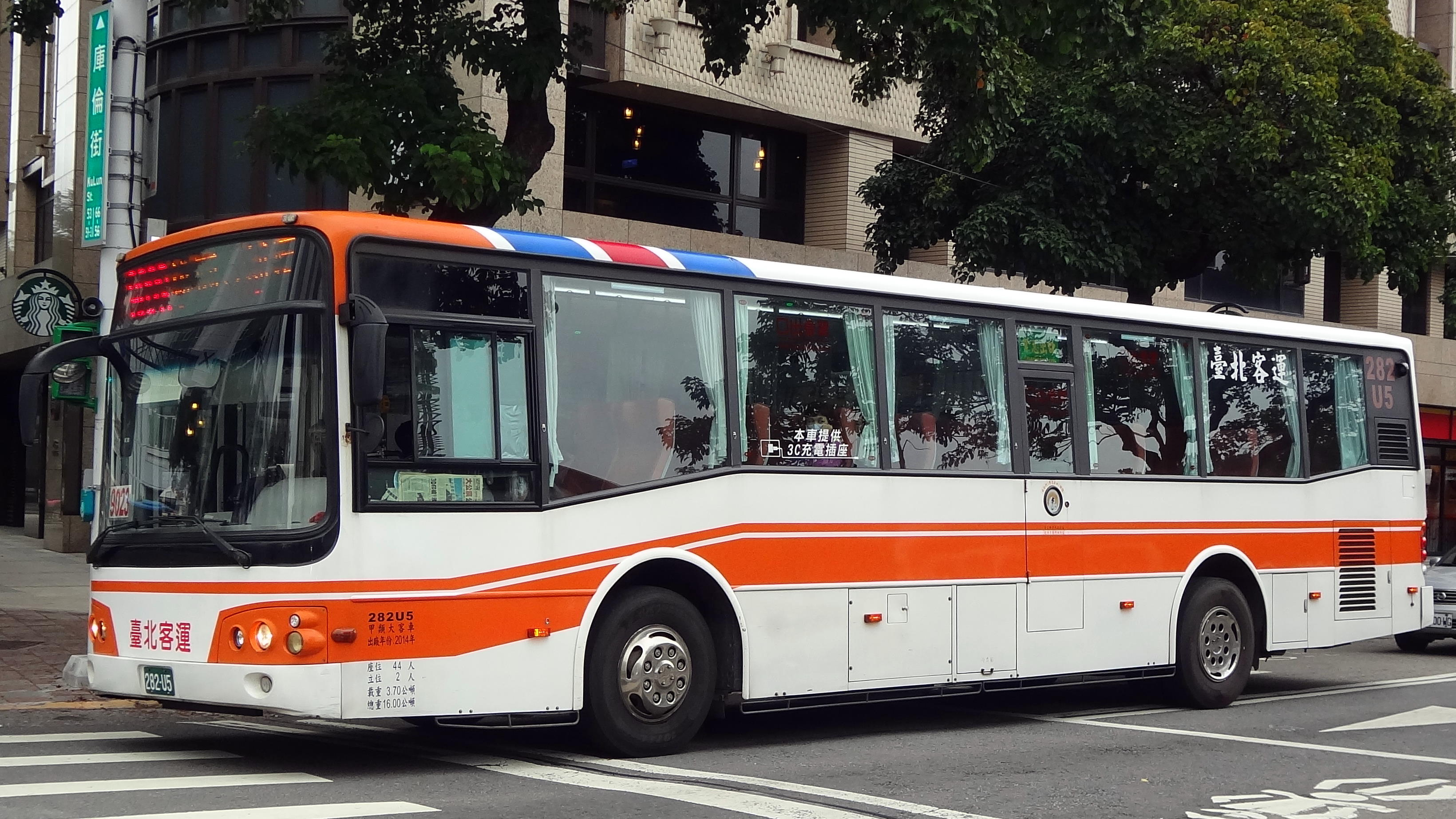 臺北客運2014年大客車282-U5行駛9023線，停在臺北市大同區庫倫街。